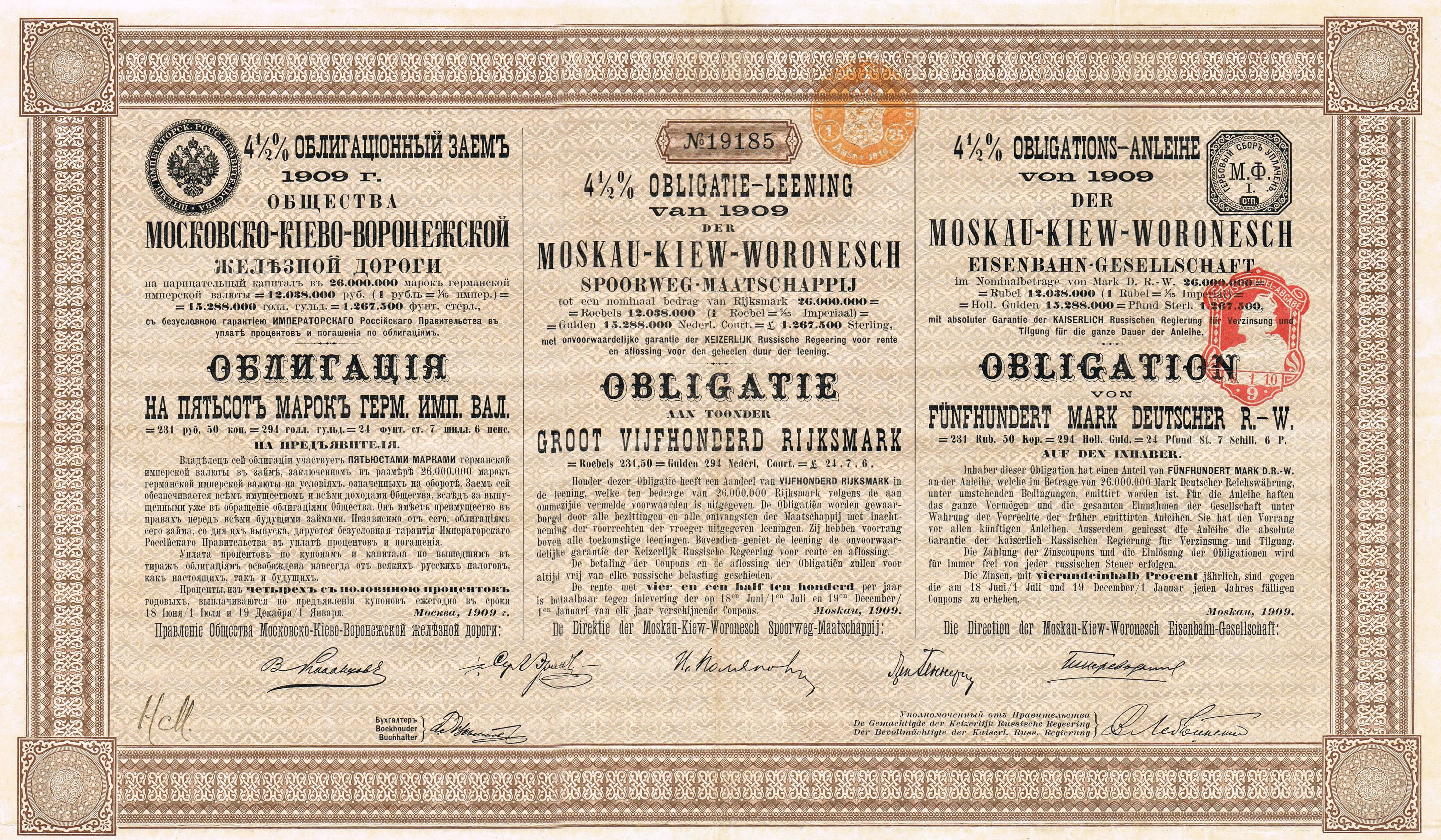 Obligatie lening uit 1909 om de aanleg van een spoorlijn te bekostigen in Rusland. De koper heeft hiervan nooit een cent teruggezien!